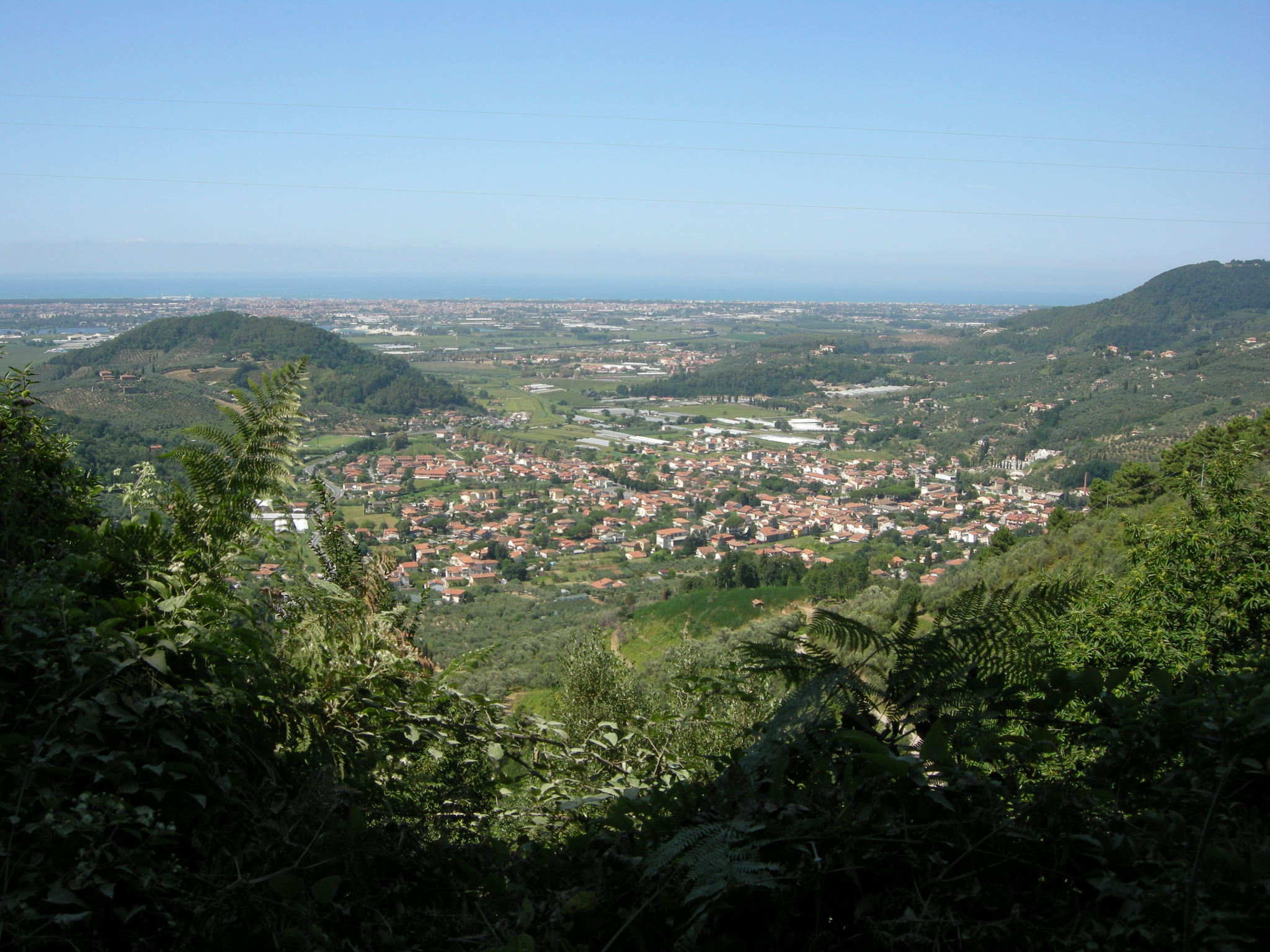 Stiava, view